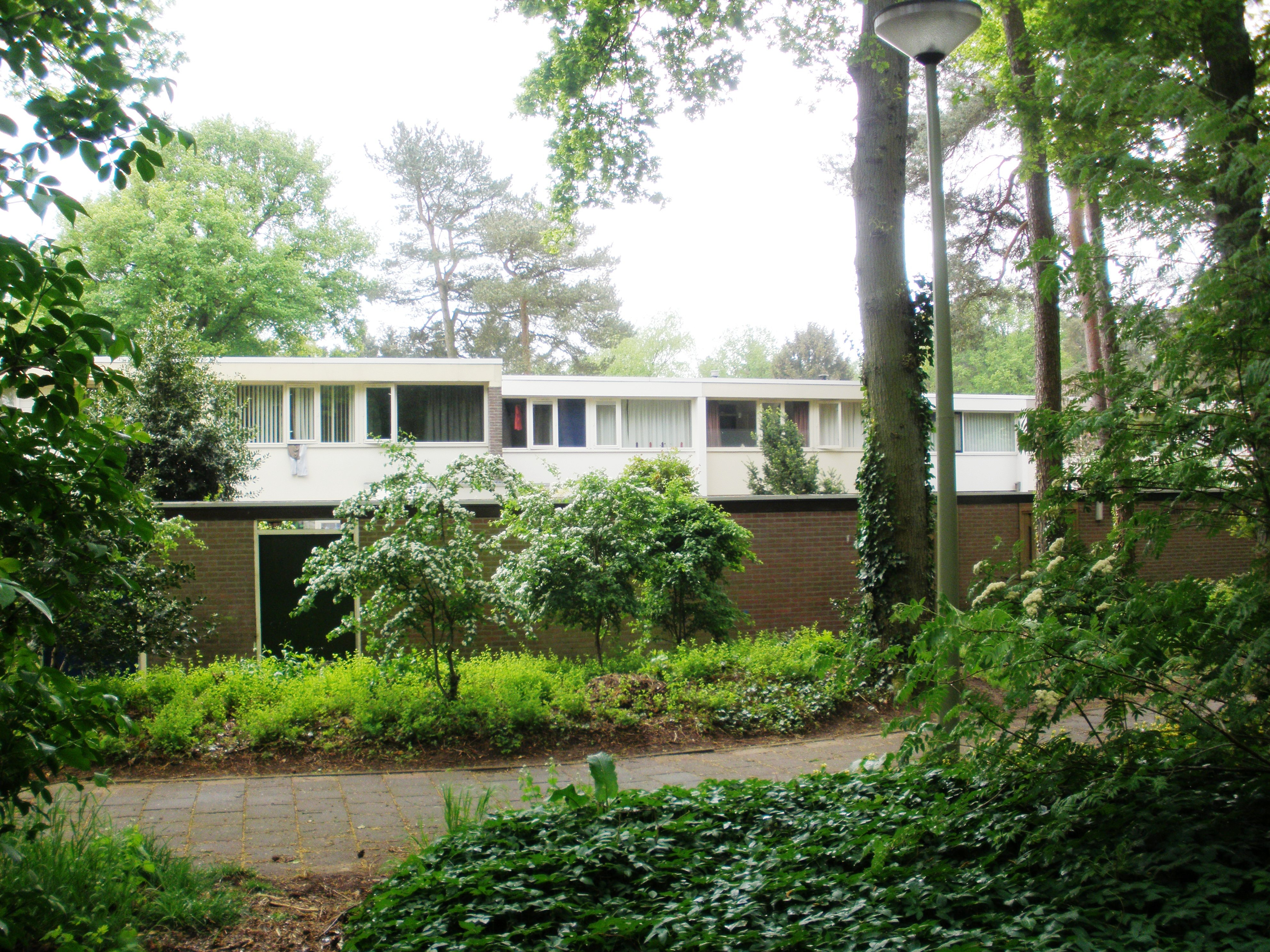 Huizen met platte daken aan de Laan van de Eekharst in de wijk Emmerhout van Emmen.